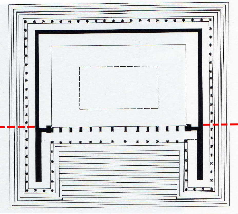 Rekonstruierter Grundriss des Pergamonaltars